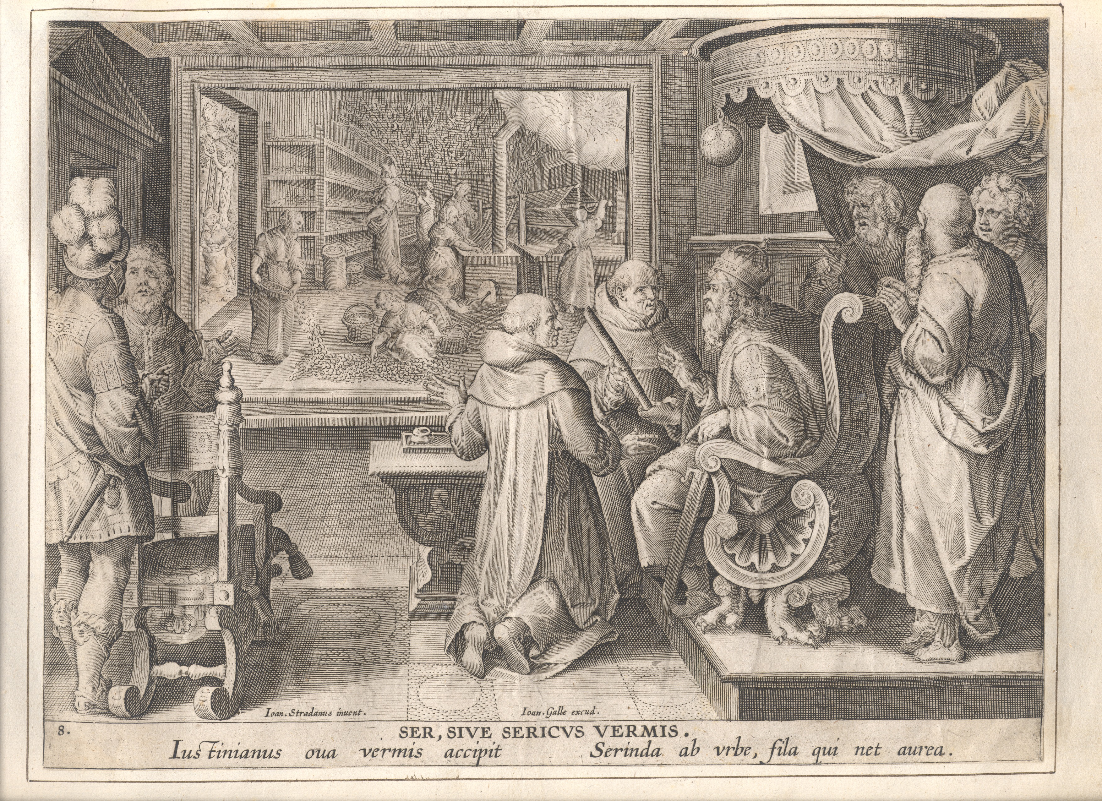 anonymous: The production of silk Artist anonymousDesigner Stradanus (1523–1605) Alternative names Jan van der Straet, Giovanni della Strada, Johannes della Strada, Giovanni Stradano, Johannes Stradano, Giovanni Stradanus, Johannes Stradanus, Jan van Straeten, Jan van StratenDescriptionFlemish painter and draughtsmanDate of birth/death 1523 2 November 1605 Location of birth/death Bruges FlorenceWork location Antwerp (1545), Florence (circa 1550-1605), Rome (circa 1550-1553), Montemurlo (1590)Authority control : Q143595 VIAF: 29699451 ISNI: 0000 0000 8108 906X ULAN: 500011304 LCCN: n84804240 NLA: 35875335 WorldCat creator QS:P170,Q143595 Title De kweek van de zijderups en de productie van zijdePublisher Jan Galle Object type engraving Description Gravure , anoniem, Museum Plantin-MoretusMedium gravureCollection Museum Plantin-Moretus Native nameMuseum Plantin-MoretusLocationAntwerpCoordinates51° 13′ 05.86″ N, 4° 23′ 53.39″ E Established1877 Web page control : Q595802 VIAF: 130668175 ISNI: 0000 0001 2285 9666 LCCN: n50051109 UNESCO: 1185 GND: 1007736-4 WorldCat institution QS:P195,Q595802Accession number PK OPB 0186 009References described at URL: Source/Photographer Museum Plantin-Moretus Native nameMuseum Plantin-MoretusLocationAntwerpCoordinates51° 13′ 05.86″ N, 4° 23′ 53.39″ E Established1877 Web page control : Q595802 VIAF: 130668175 ISNI: 0000 0001 2285 9666 LCCN: n50051109 UNESCO: 1185 GND: 1007736-4 WorldCat institution QS:P195,Q595802Permission(Reusing this file) This file is made available under the Creative Commons CC0 1.0 Universal Public Domain Dedication. The person who associated a work with this deed has dedicated the work to the public domain by waiving all of their rights to the work worldwide under copyright law, including all related and neighboring rights, to the extent allowed by law. You can copy, modify, distribute and perform the work, even for commercial purposes, all without asking permission. Gravure , anoniem, Museum Plantin-Moretus